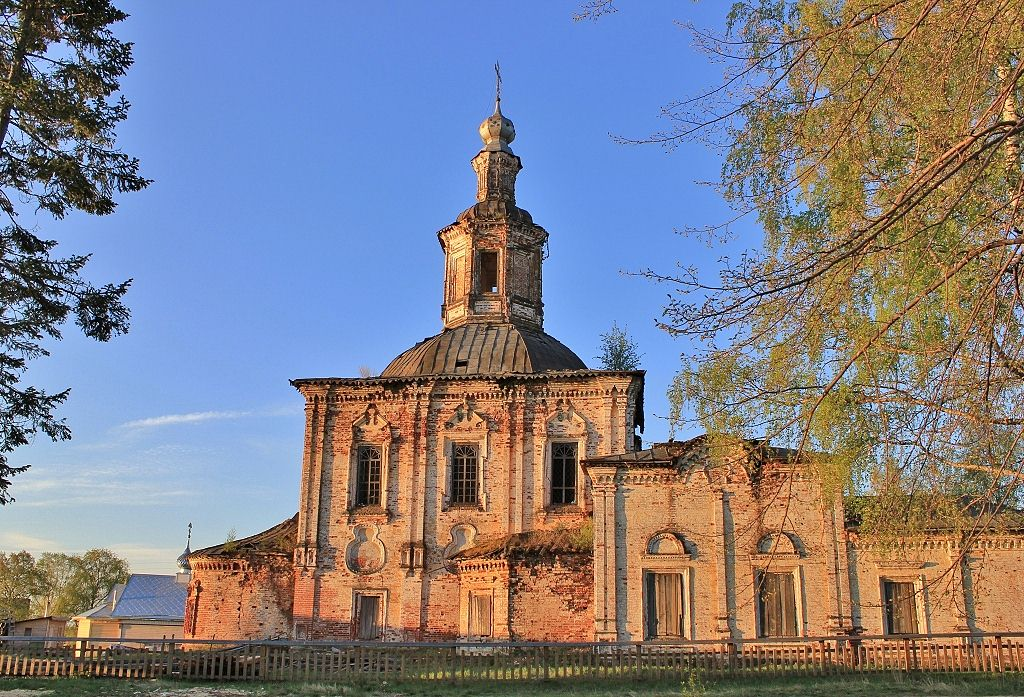 Свято-Троицкий храм. Год постройки 1727. Архангельская область, Красноборский район, село Черевково